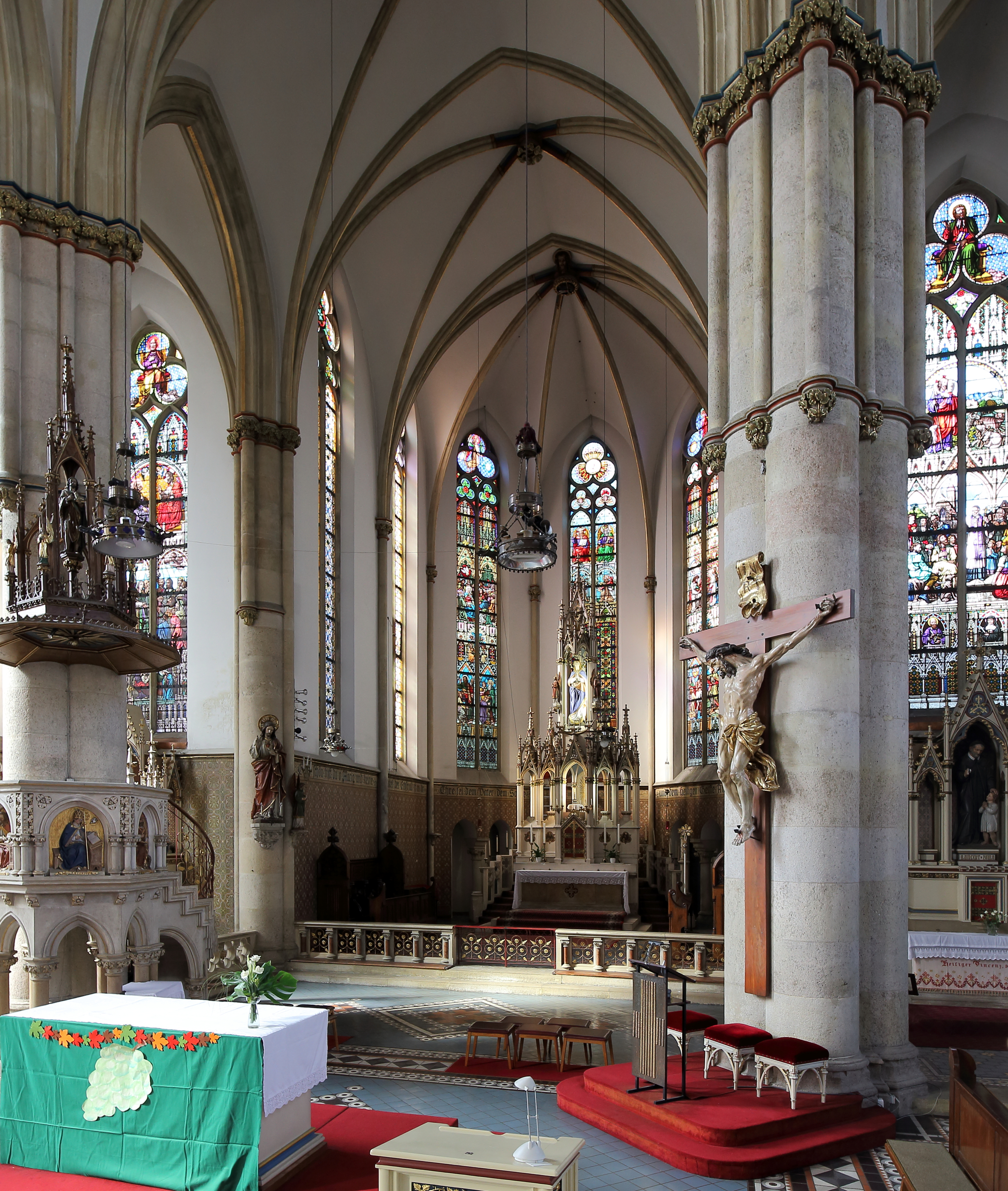 Lazaristenkirche im 7. Wiener Gemeindebezirk Neubau. Die Lazaristenkirche wurde als Ordenskirche für die 1853 nach Österreich berufenen Lazaristen nach Plänen des Architekten Friedrich von Schmidt von 1860 bis 1862 errichtet.